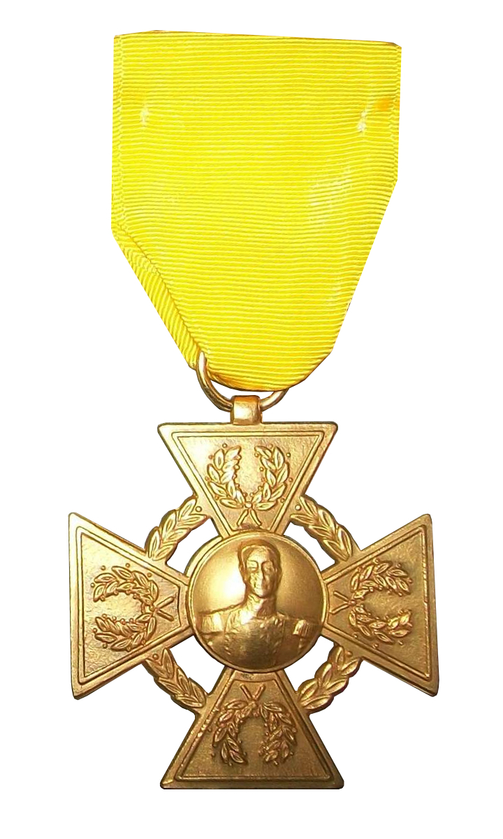 Orden Militar Rafael Urdaneta 1ra clase